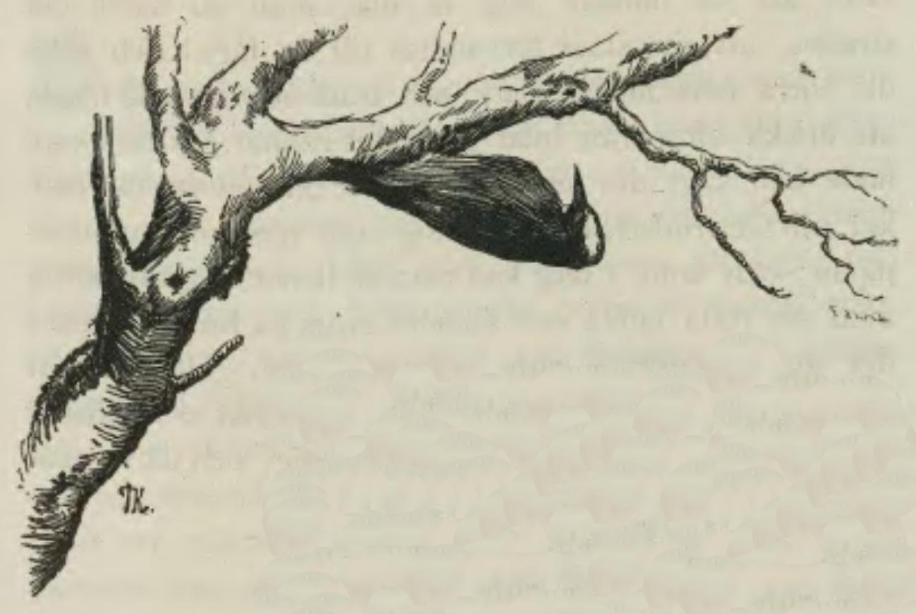 Sagobok för barn